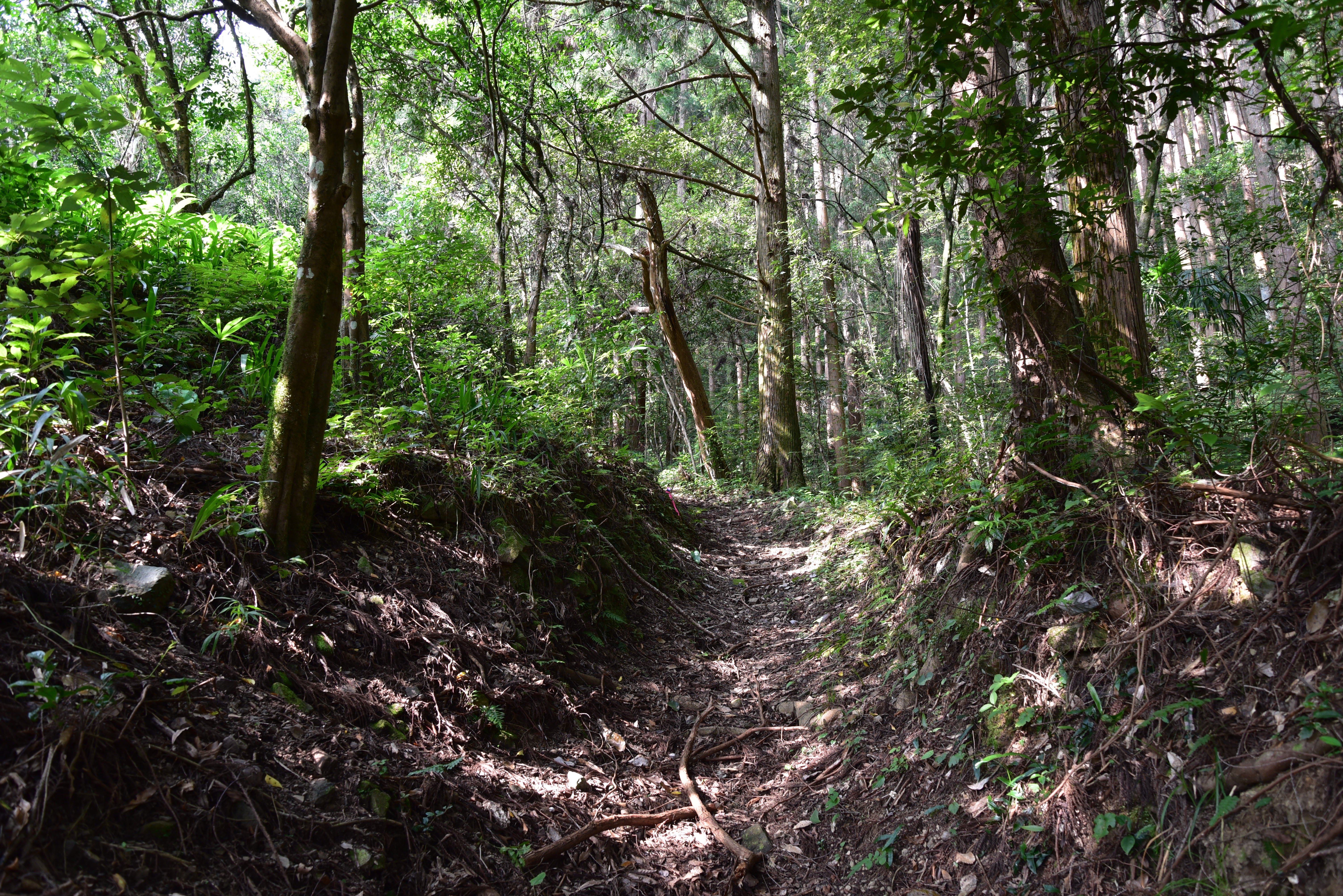 中岡慎太郎 向学の道 Nikon D750